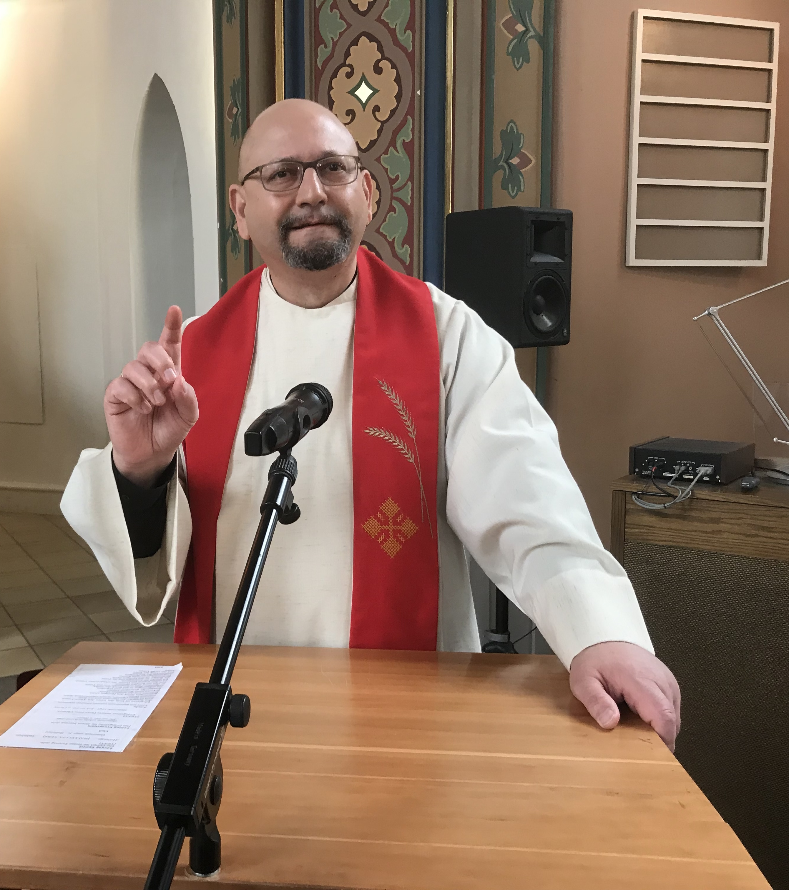 Pfarrer Erko Sturm während einer Predigt